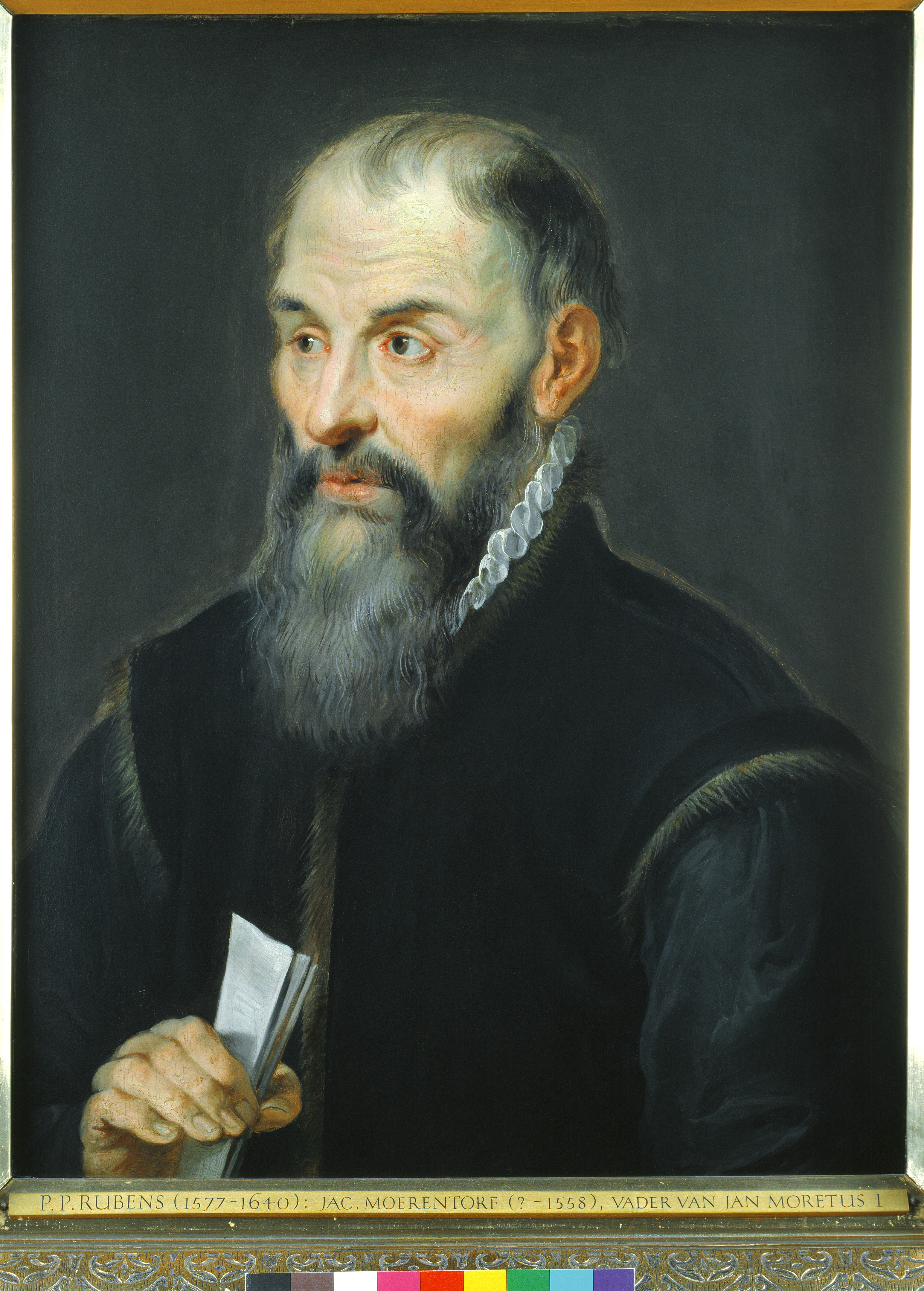 schilderij ( Peter Paul Rubens ( Museum Plantin-Moretus